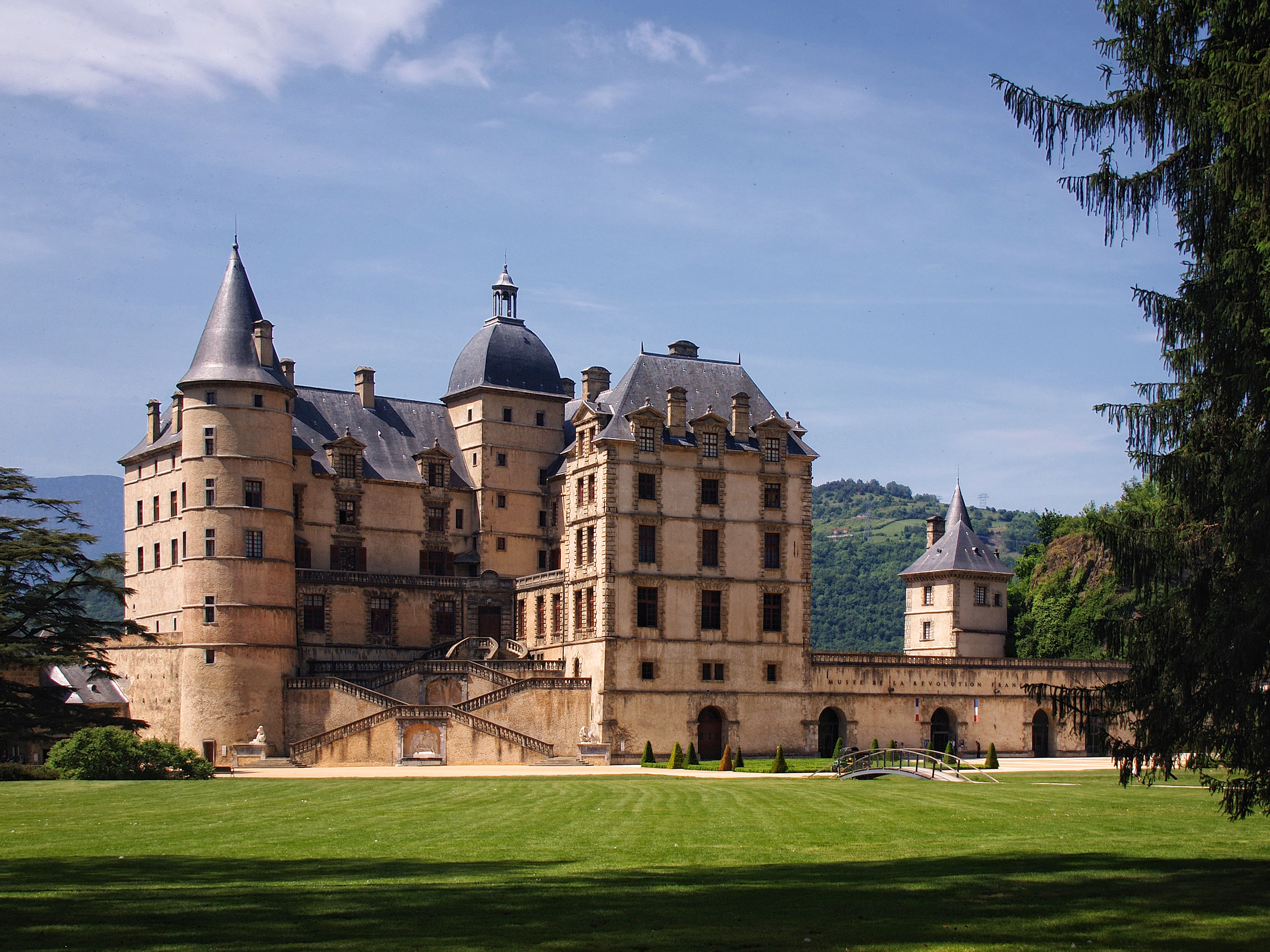 Vizille - Château Vizille et parc; Casimir Pierre Périer (* 11. Oktober 1777 in Grenoble; † 16. Mai 1832 in Paris) war ein französischer Staatsmann.